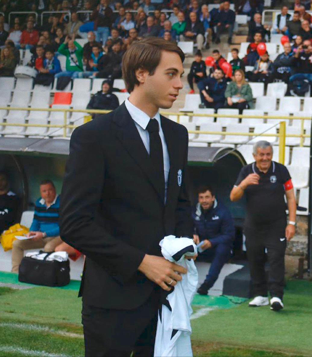 Franco Caselli en 2019